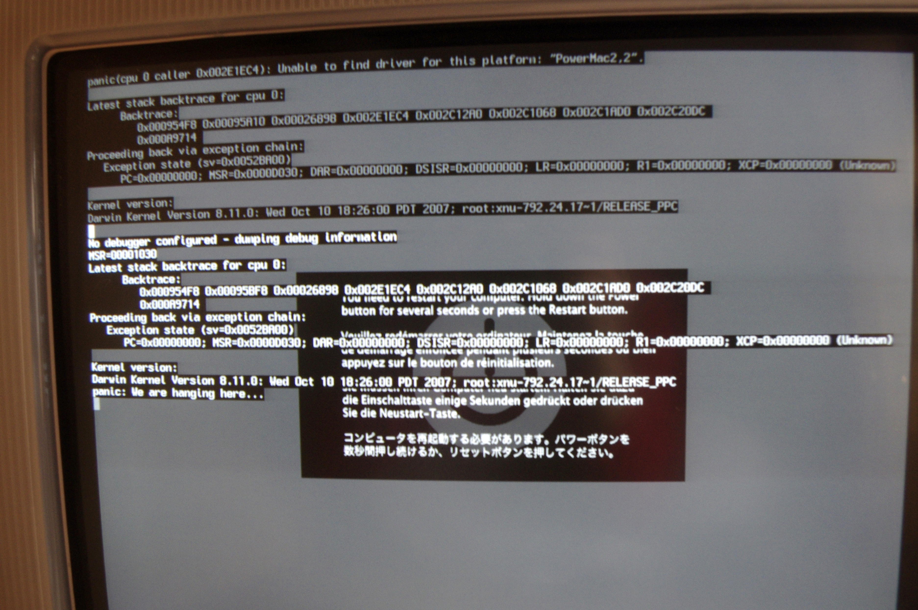 iMac G3 - écran kernel panic, message we are hanging here ...